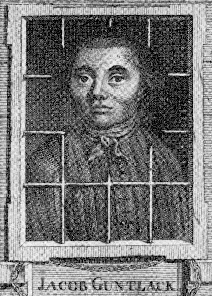 Guntlack, Jacob, dp 27 febr 1744 i Sthlm (Skeppsh), avrättad 16 jan 1771 utanför Skanstull, Sthlm. Föräldrar: sprutlagaren Abraham G o Maria Elisabet Rial. Tjuv o mästerrymmare. — Ogift.